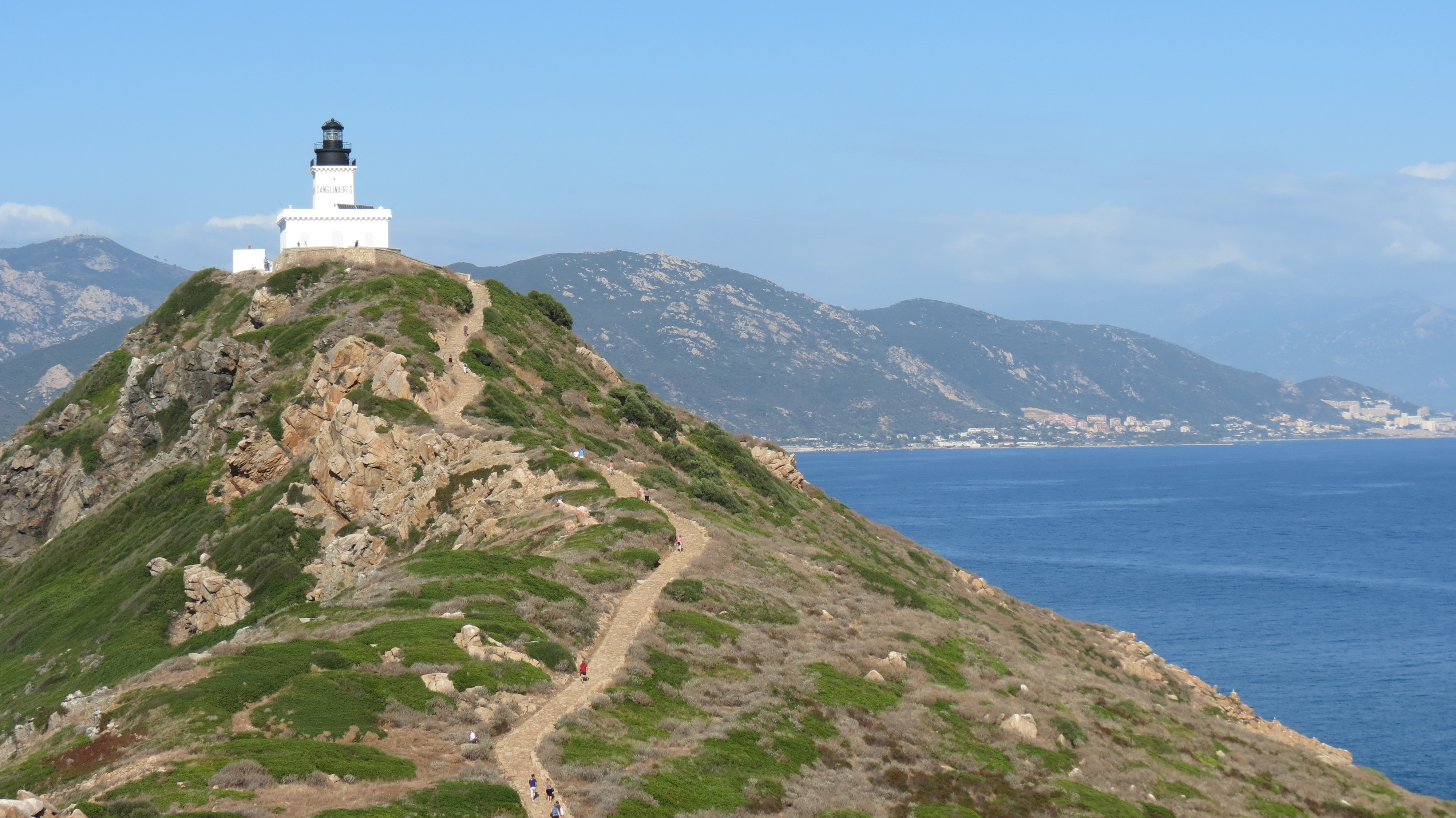 Le phare et Ajaccio en arrière plan